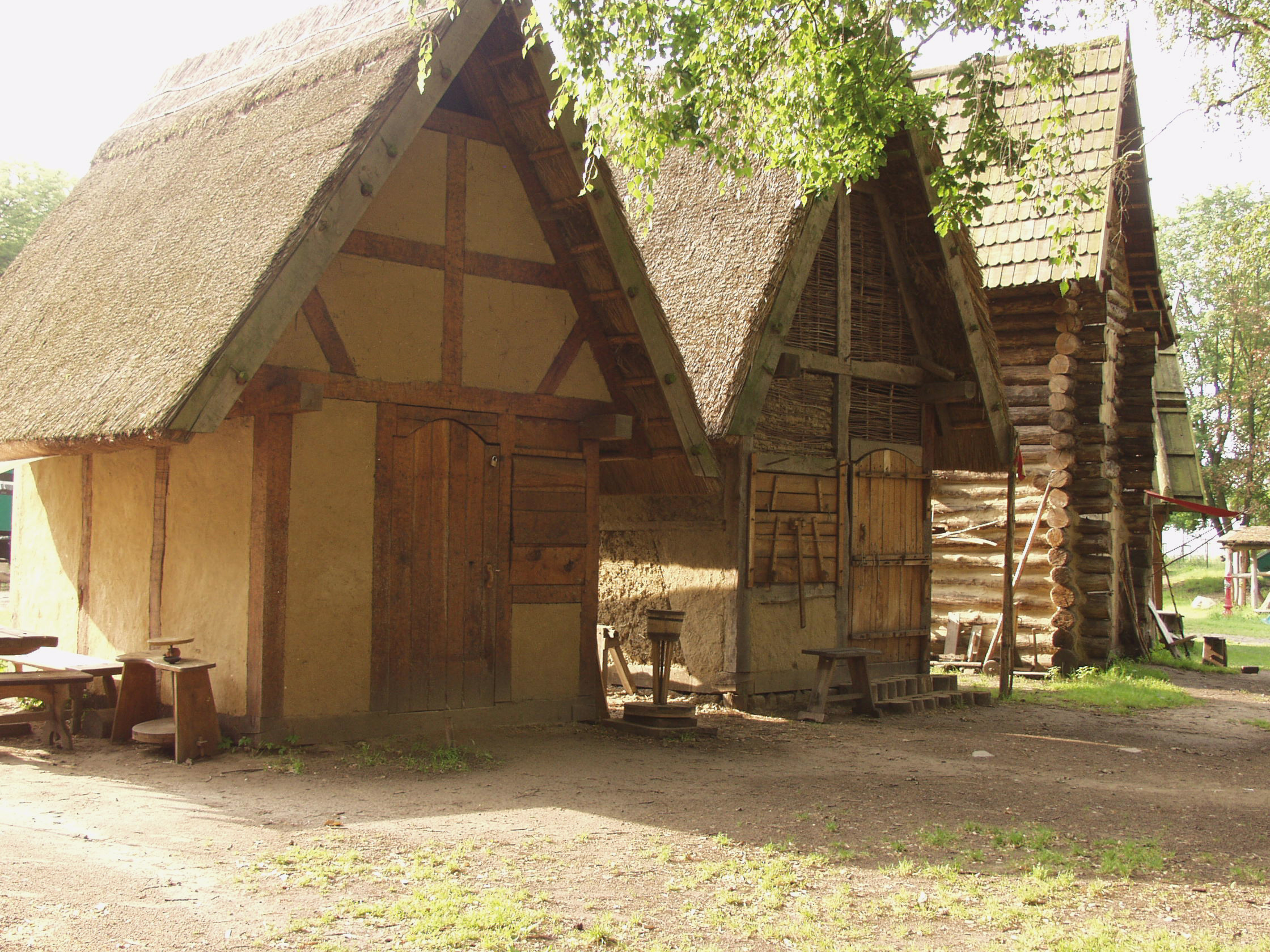 Freilichtmuseum Ukranenland, Torgelow - Im Mittelalterzentrum "Castrum Turglowe"